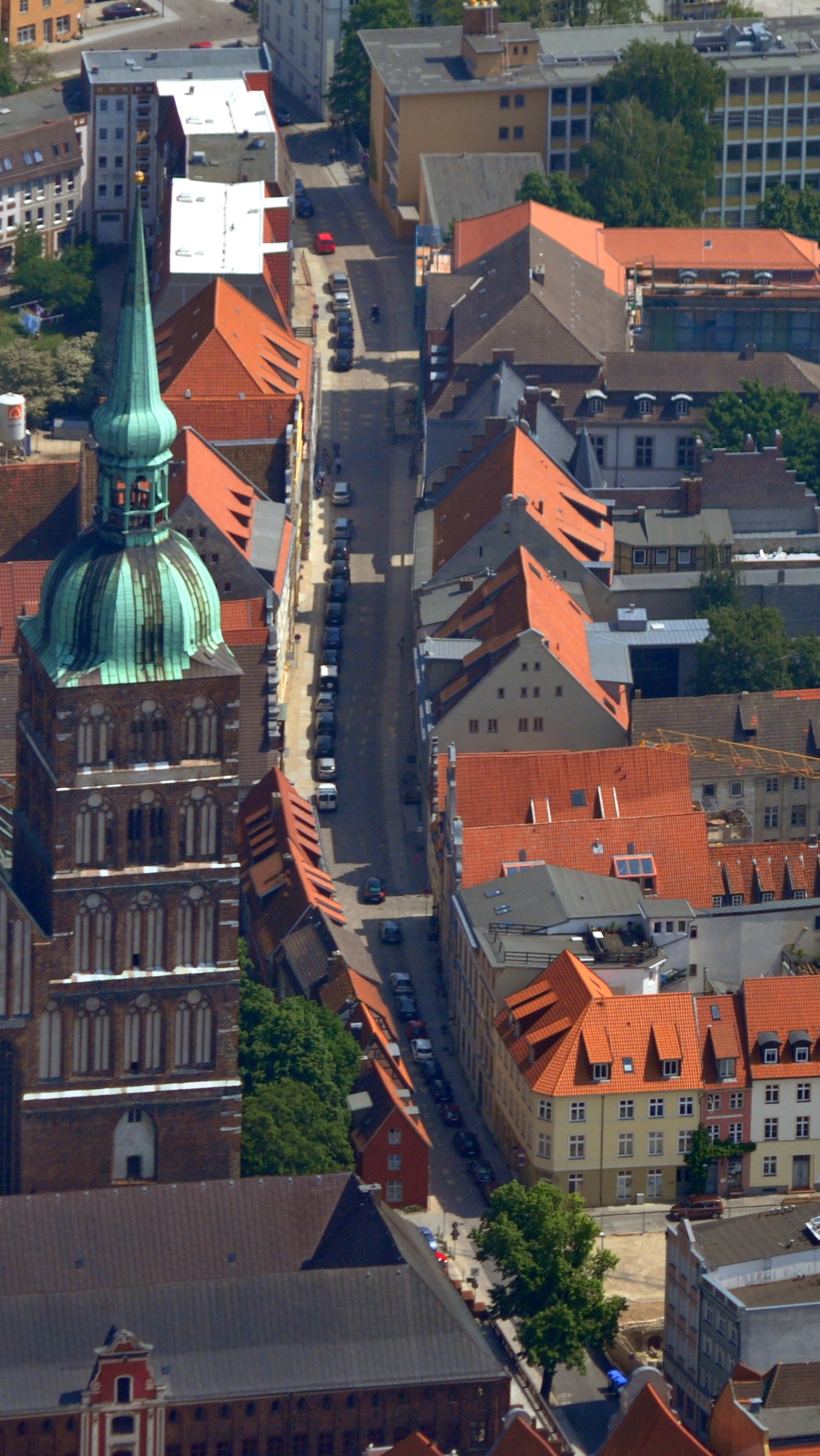 Die Bilder wurden von mir während eines einstündigen Rundflugs ab Flugplatz Güttin am 21. Mai 2011 aufgenommen. Die Bildbeschreibung steht im Dateinamen. Aufgenommen mit einer Nikon D5000 durch das Seitenfenster des Flugzeugs.